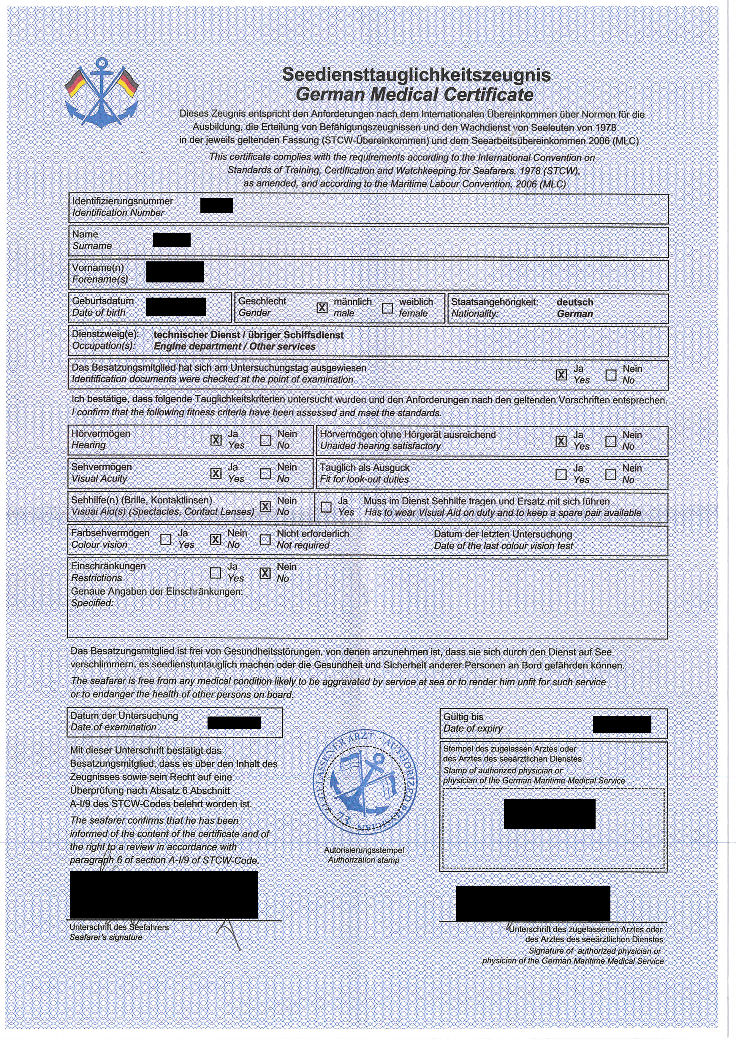 german medical certificate for seafarers